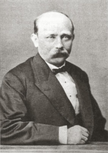 Kommerzienrat Carl Hubert Vering, Gründer des Tiefbauunternehmens C. Vering (1855) und der Eisenbahn-Bau und Betriebsgesellschaft Vering & Waechter (1885)